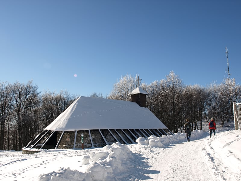 Kapela Svetog Ilije na Svetoj Geri